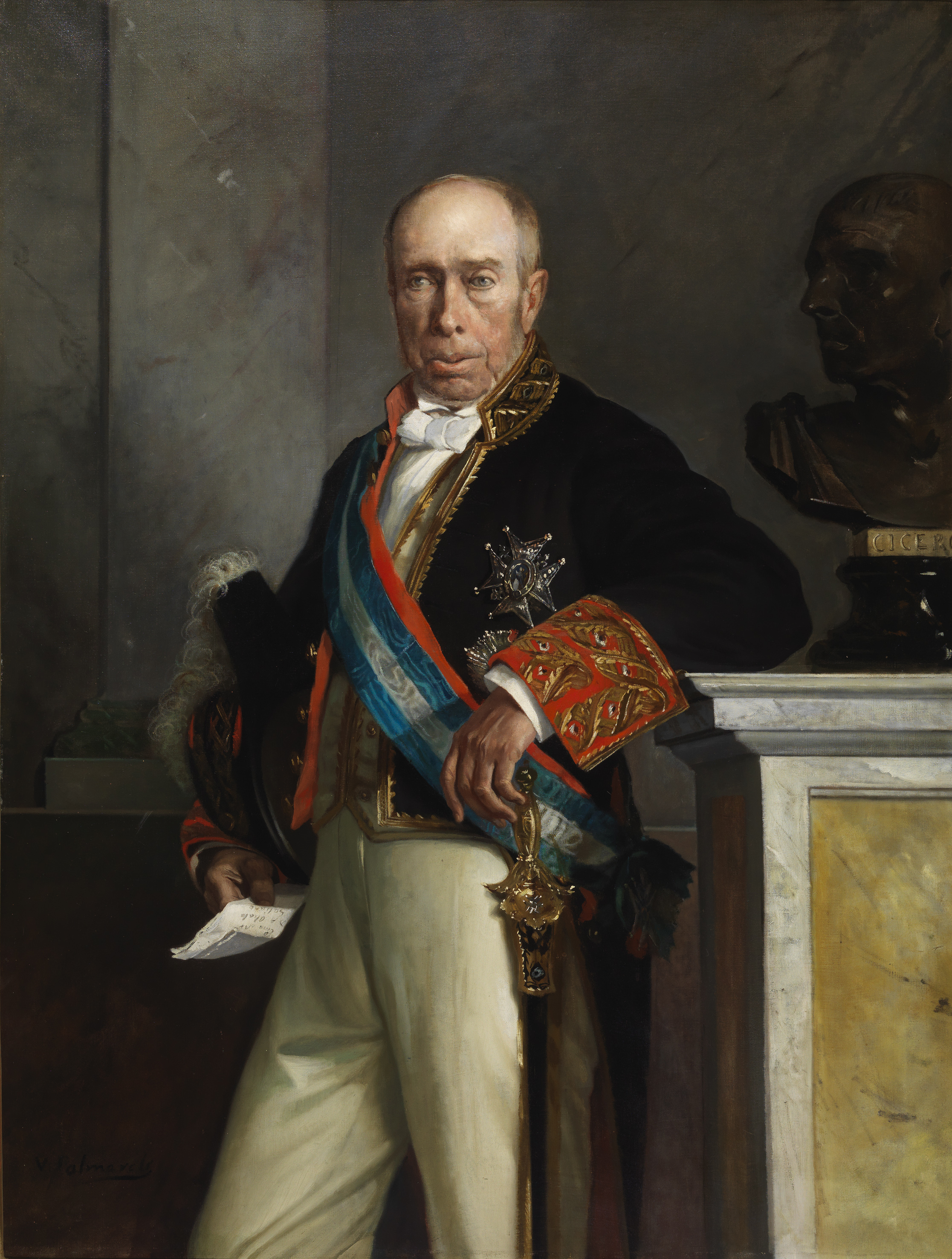 Retrato del politico y escritor español Antonio Alcalá Galiano (1789-1865), que llegó a ser ministro de Marina y de Fomento durante el reinado de Isabel II de España, y también miembro de la Real Academia de la Historia.